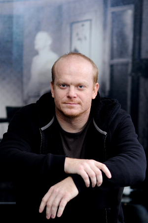 David Novotný (nar. 1969) je český herec.